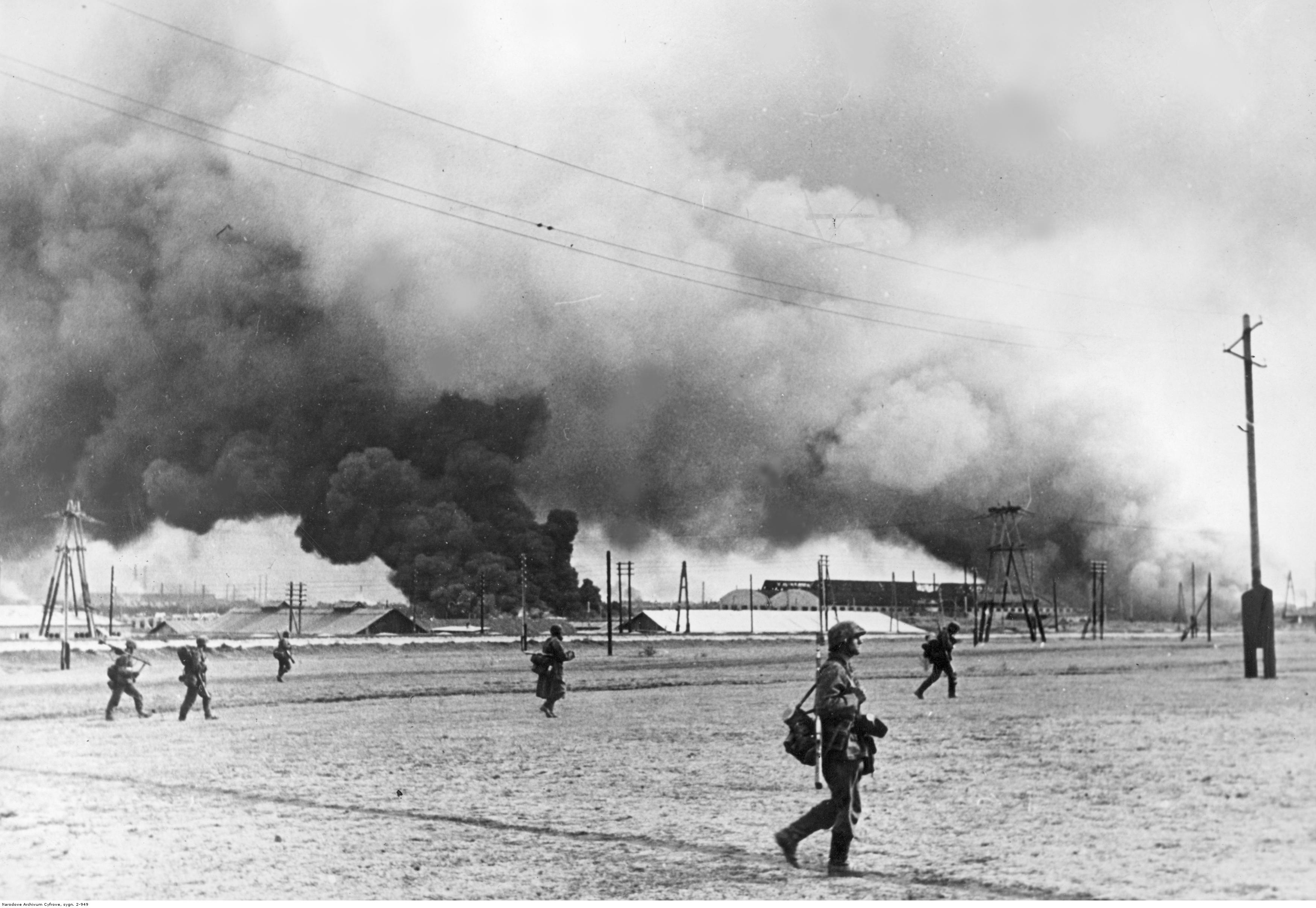 Żołnierze 1. Dywizji Pancernej "Leibstandarte SS Adolf Hitler" wkraczają do płonącego Taganrogu.